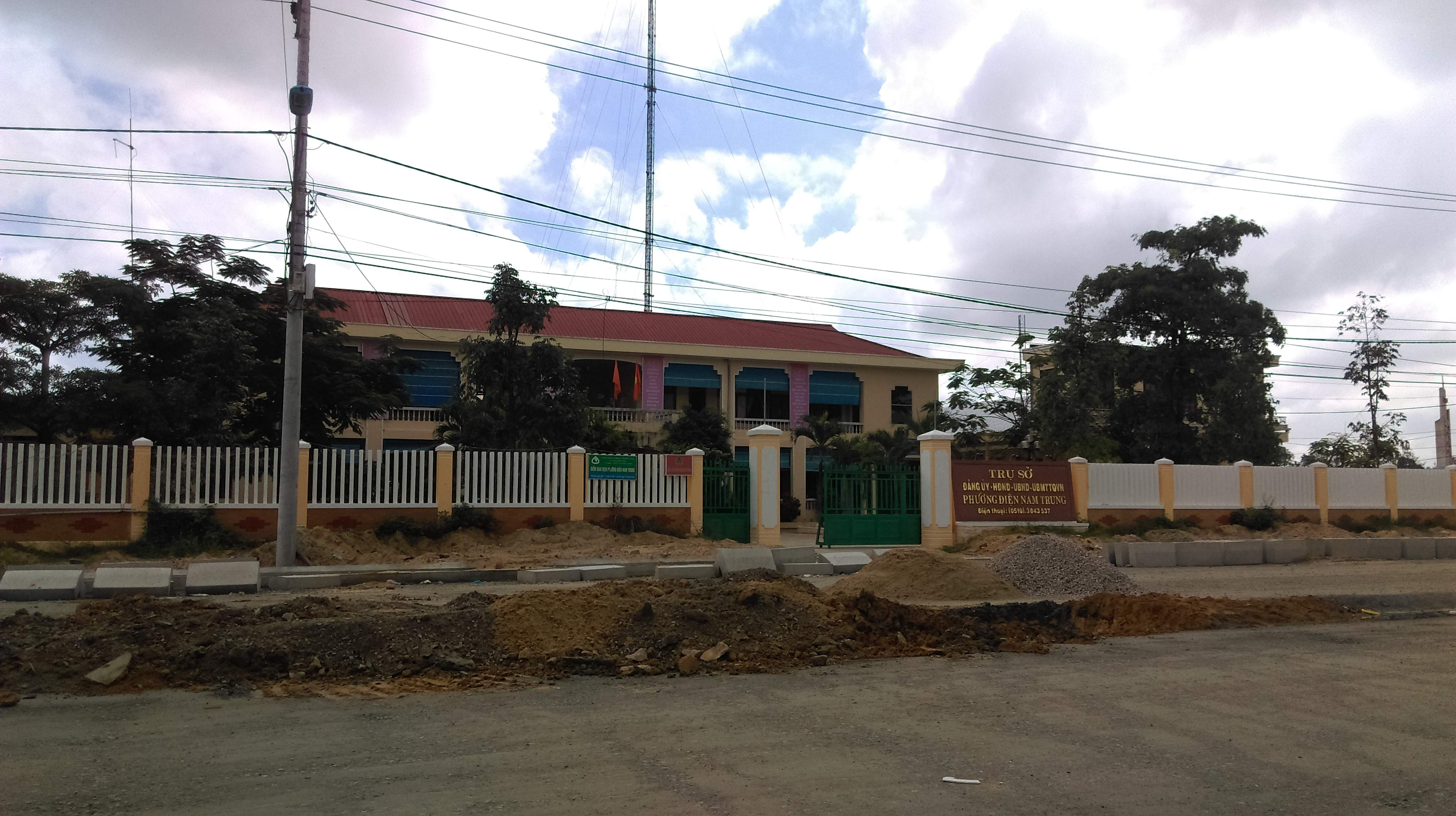 UBND phường Điện Nam Trung, Điện Bàn, Quảng Nam